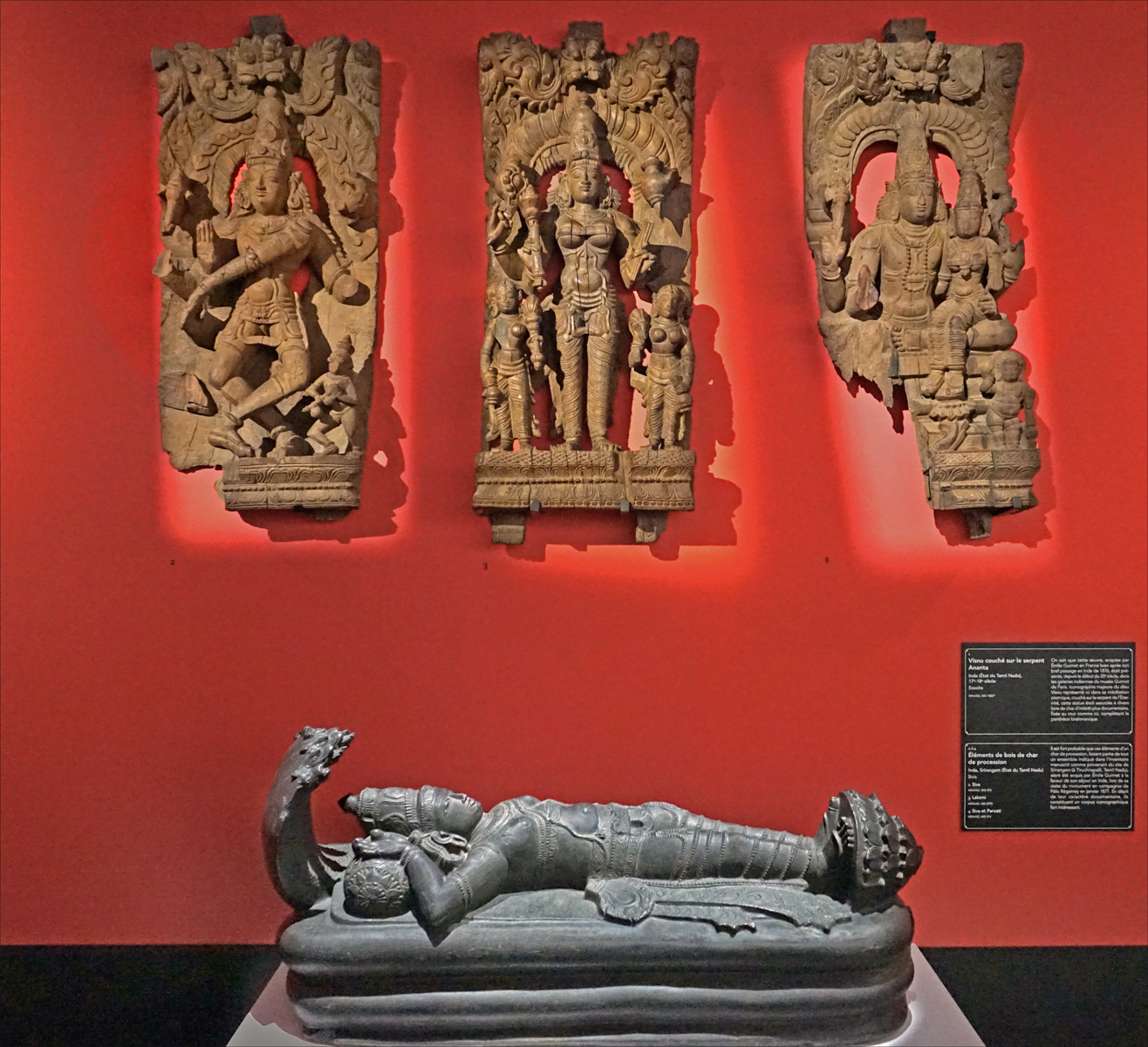 Au mur, éléments de bois de char de procession Inde, Srirangam (Tamil Nadu), bois avec de gauche à droite : Siva, Laksmi, Siva et Parvati Au sol, Visnu (Vishnu) couché sur le serpent Ananta Inde (Tamil Nadu), 17-18è siècle, Basalte Objets des collections du MNAAG achetés par Émile Guimet Autre représentation de Visnu allongé sur le serpent Ananta (photo dalbera) Exposition "Enquêtes vagabondes, le voyage illustré d'Émile Guimet en Asie" au musée national des arts asiatiques-Guimet (MNAAG), Paris